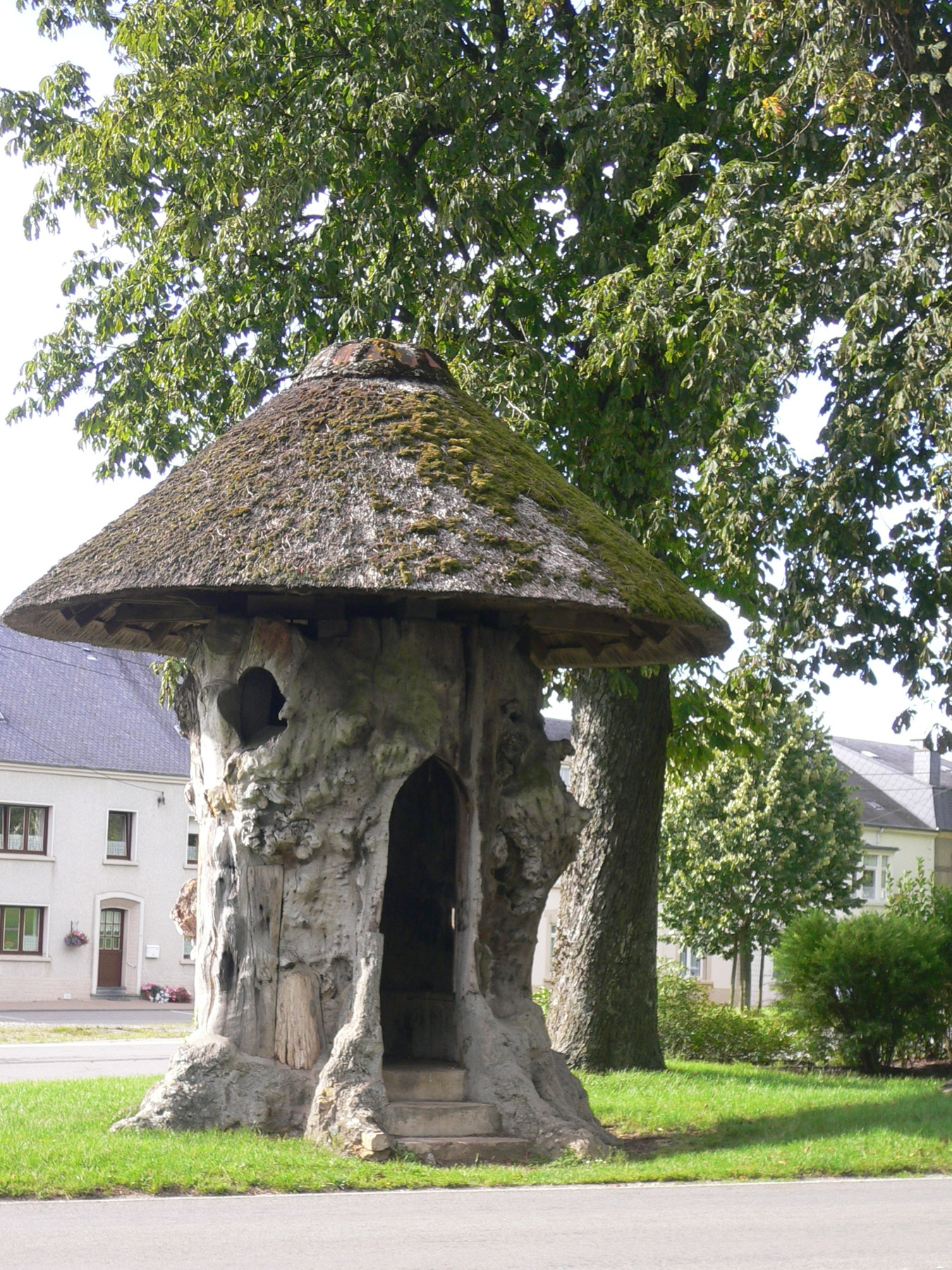 Orme de Gérouville, Meix-devant-Virton